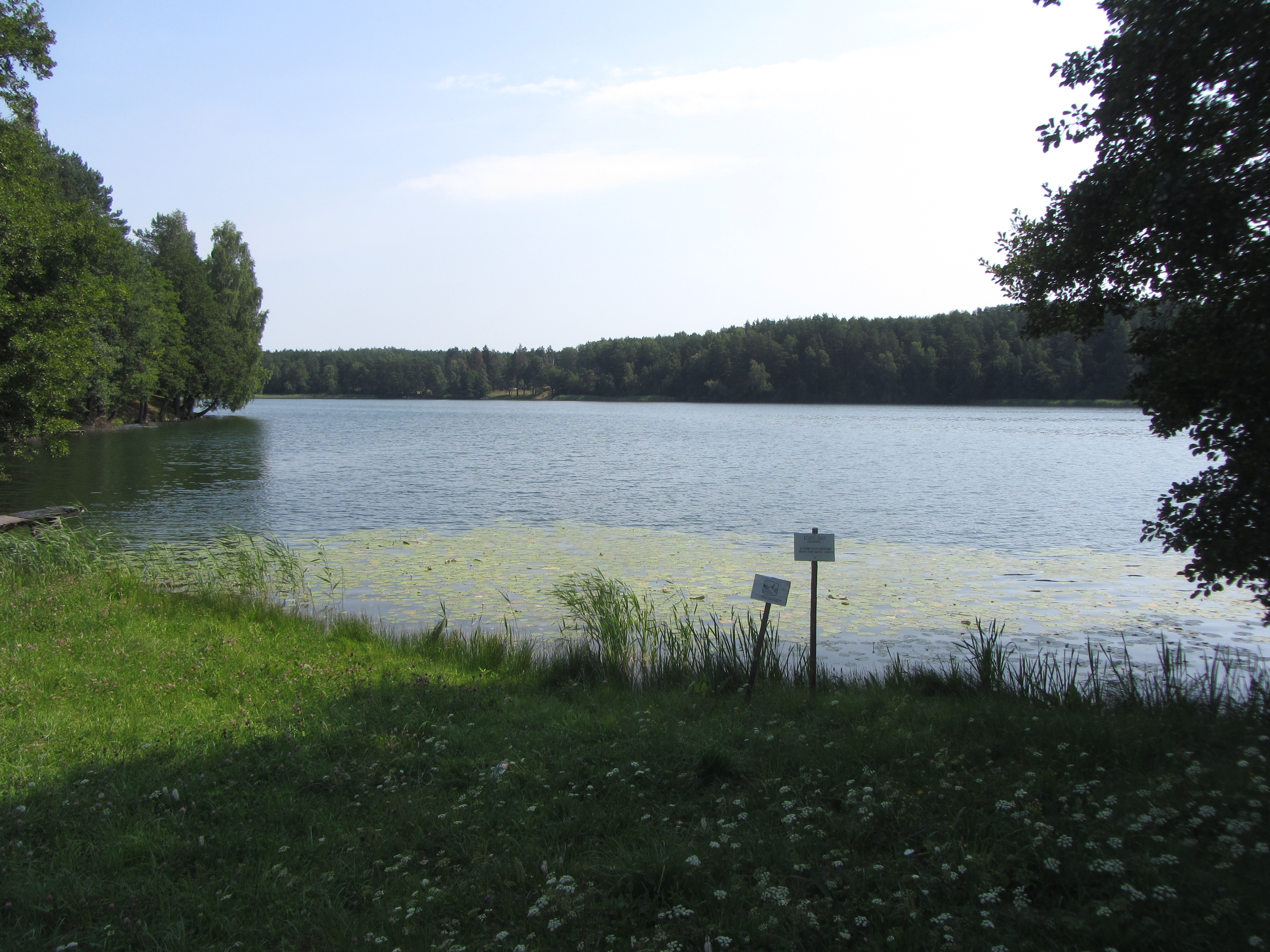 Veisiejų sen., Lithuania